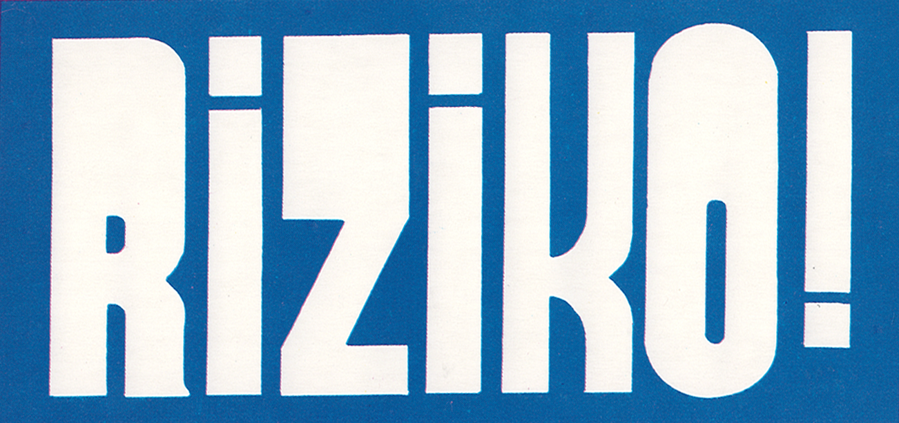 Riziko! adlı yarışma programının logosu.